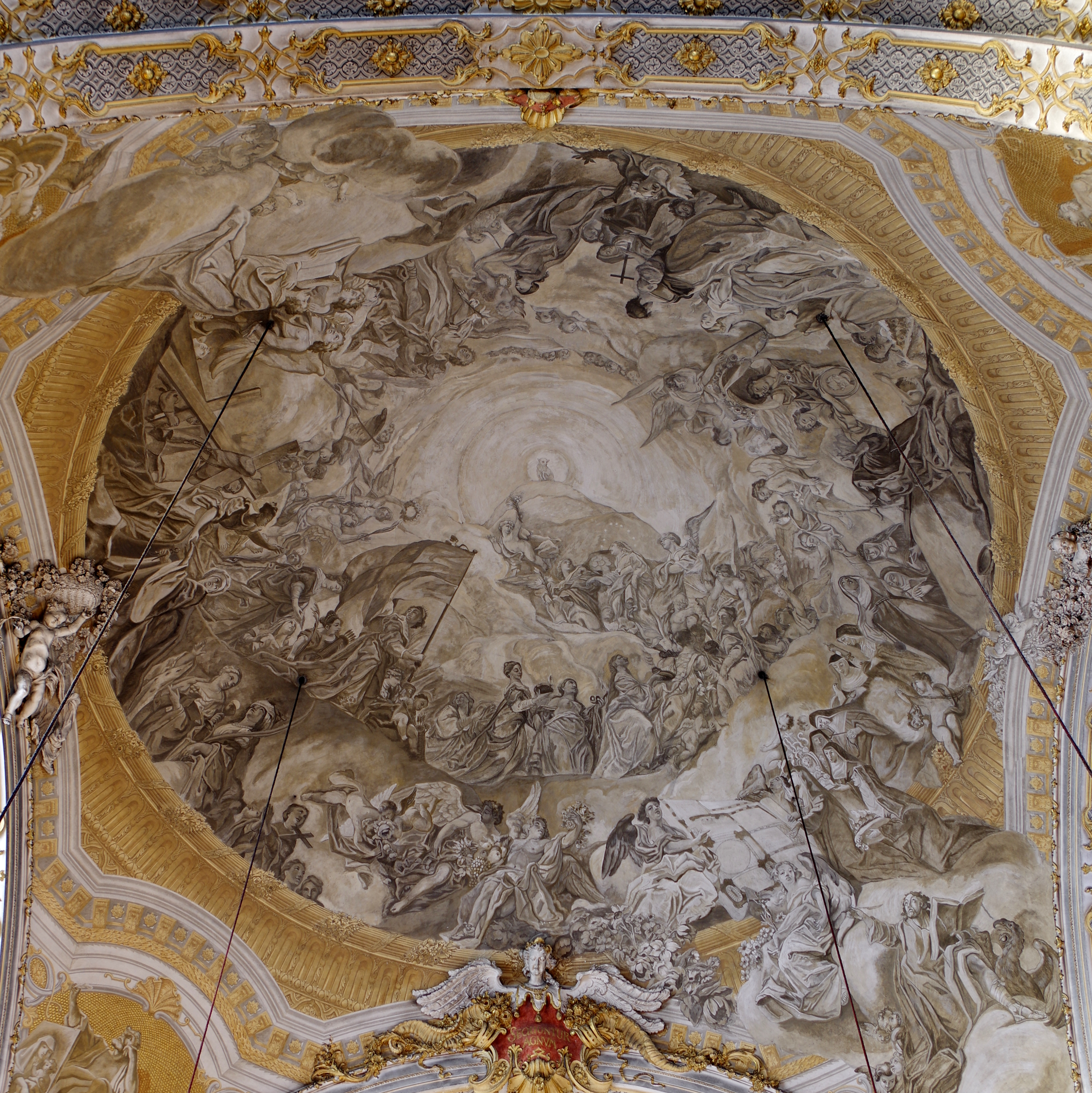 München,Damenstiftstraße 1, Kath. Damenstiftskirche St. Anna, Akten-Nr. D-1-62-000-1214